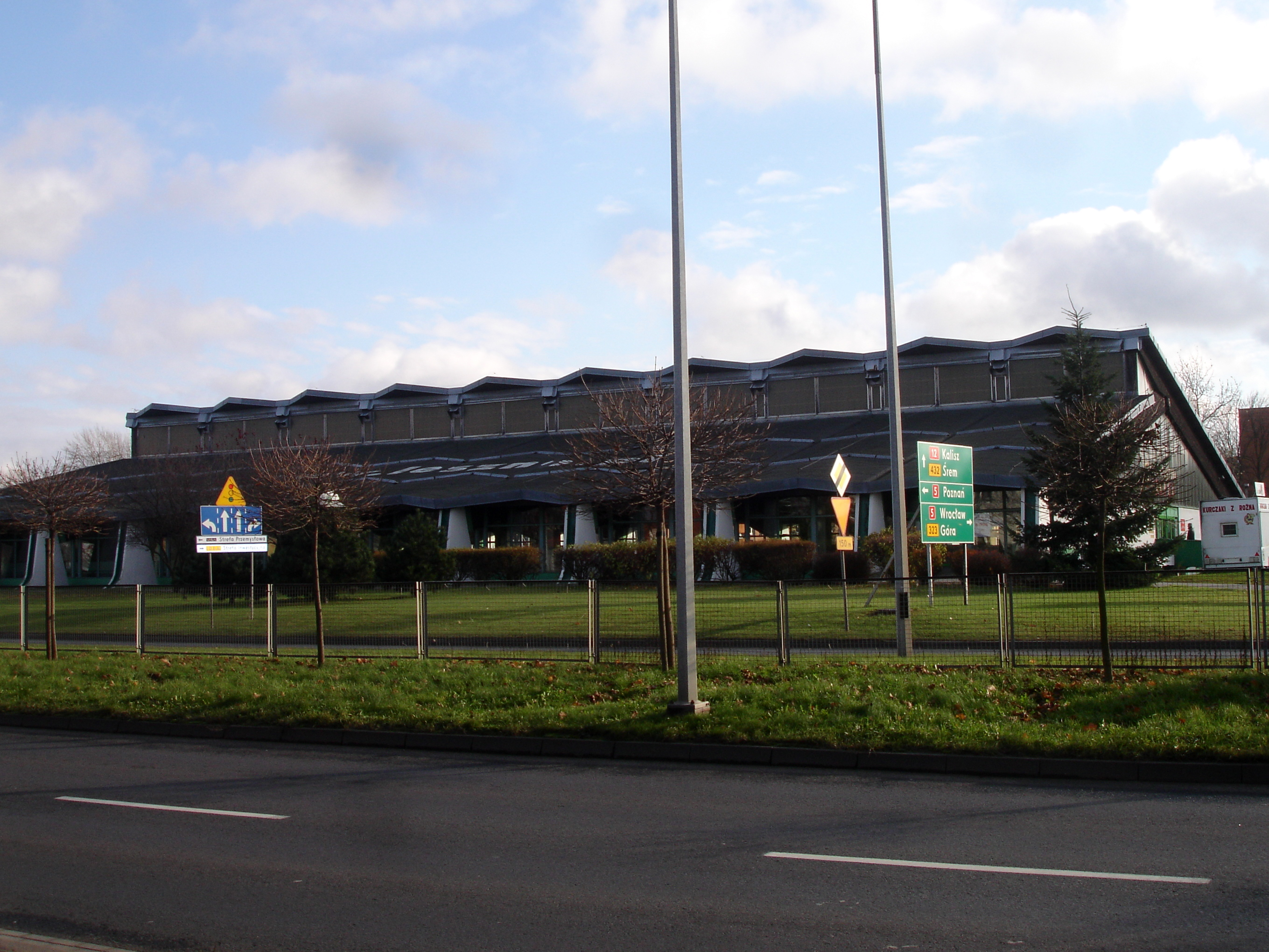 Hala sportowo-widowiskowa "Trapez" w Lesznie, ul. Zygmunta Starego 1